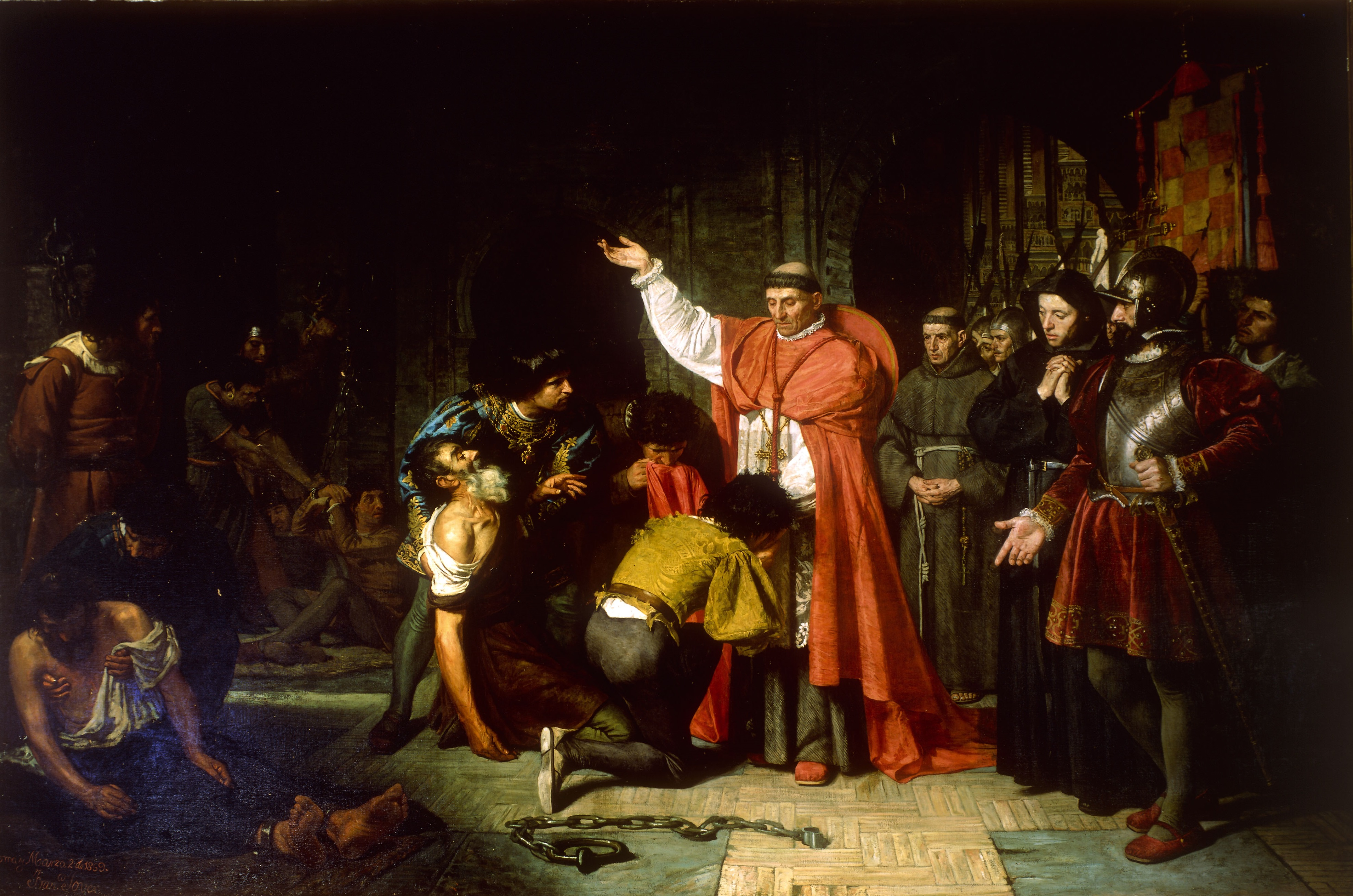 El lienzo representa al cardenal Francisco Jiménez de Cisneros liberando a los prisioneros cristianos de Orán tras la conquista de dicha ciudad, que cayó en manos de las tropas castellanas en 1509. Este cuadro fue premiado con medalla de segunda clase en la Exposición Nacional de 1871, donde obtuvo doce votos a favor, siete en contra y una abstención.